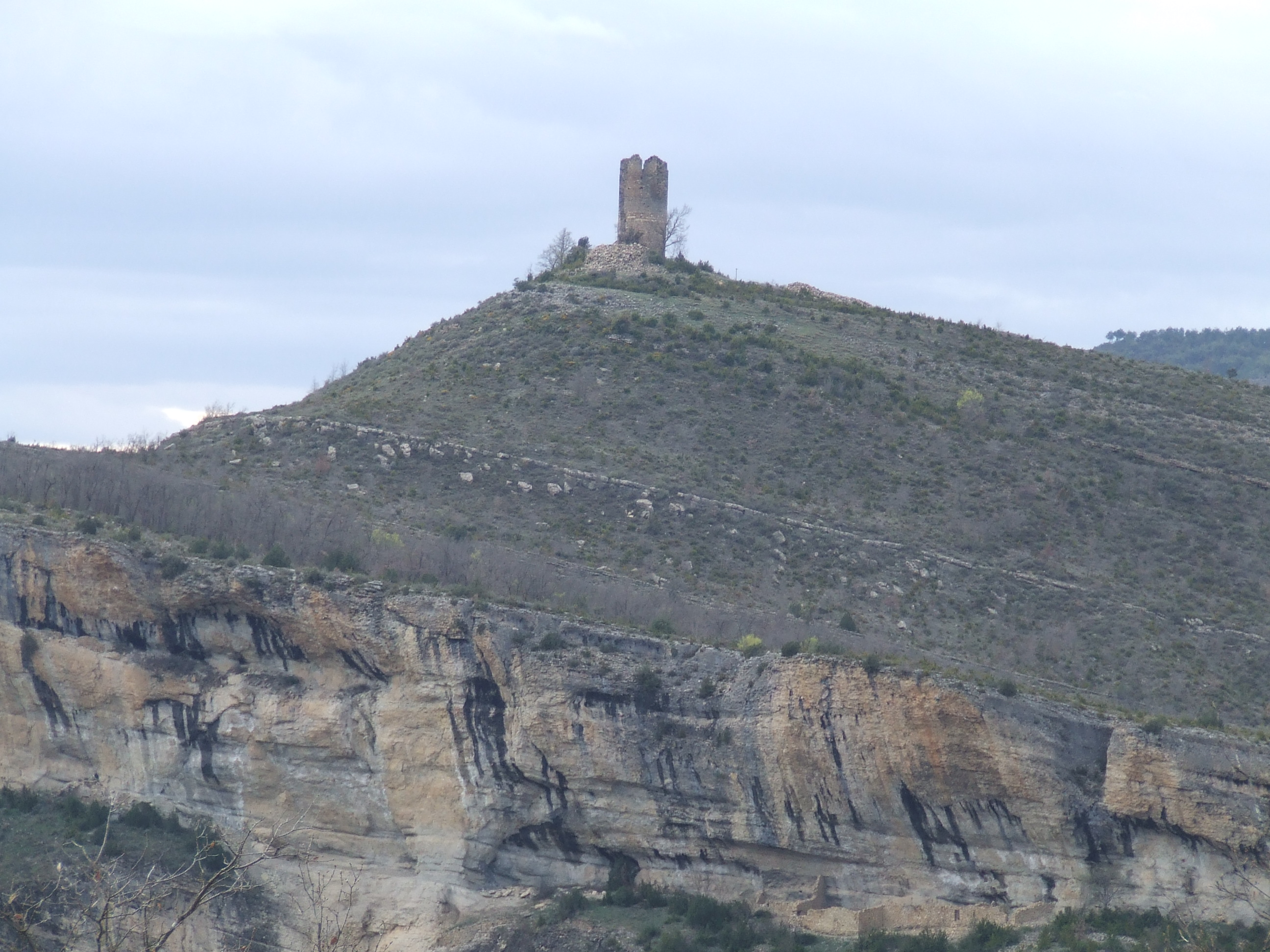 La Torre del Castell de Girbeta (El Pont de Montanyana, Alta Ribagorça)